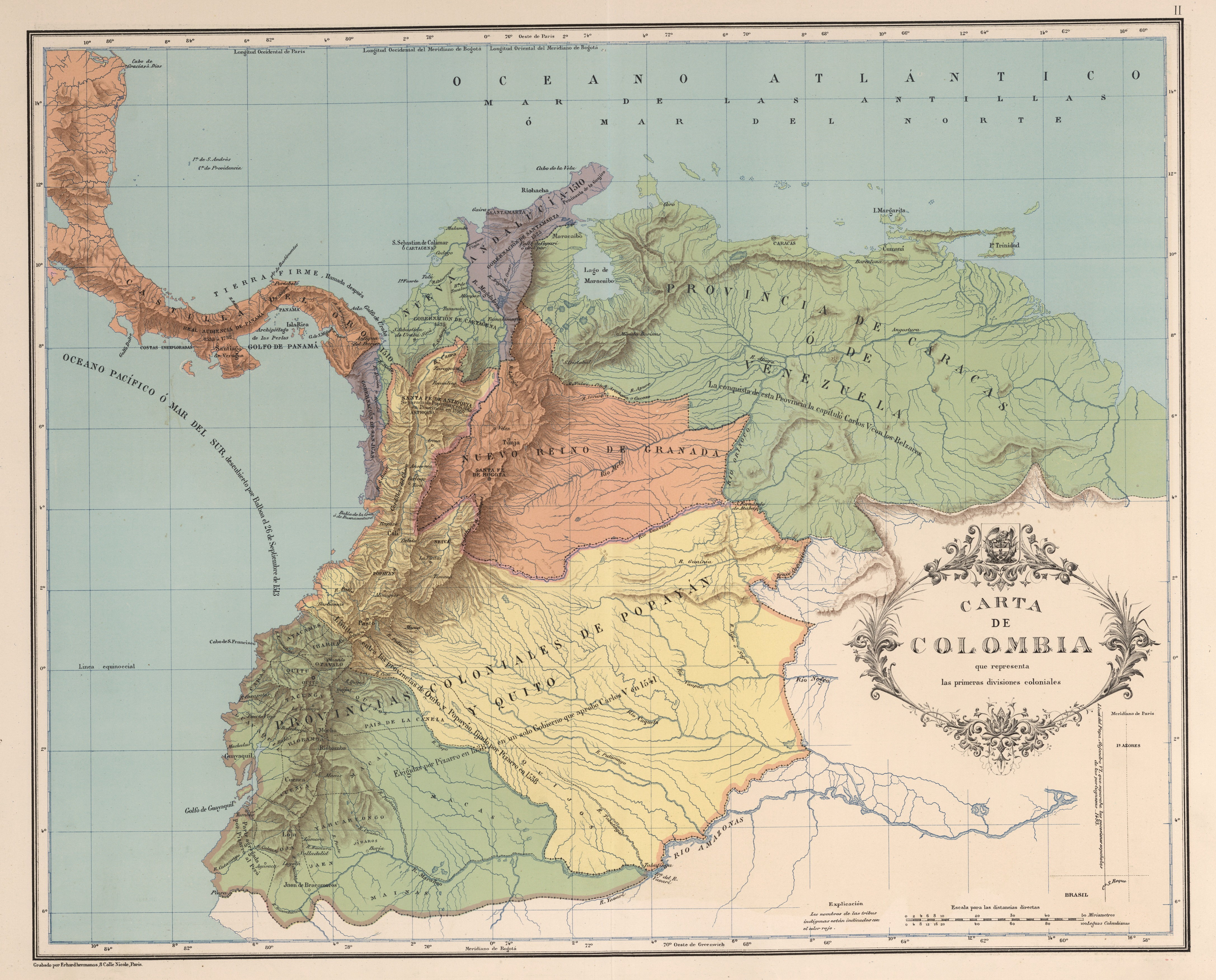 Carta de las primeras divisiones coloniales de Colombia, Ecuador y Venezuela. Carta II del Atlas geográfico e histórico de la República de Colombia, 1890.